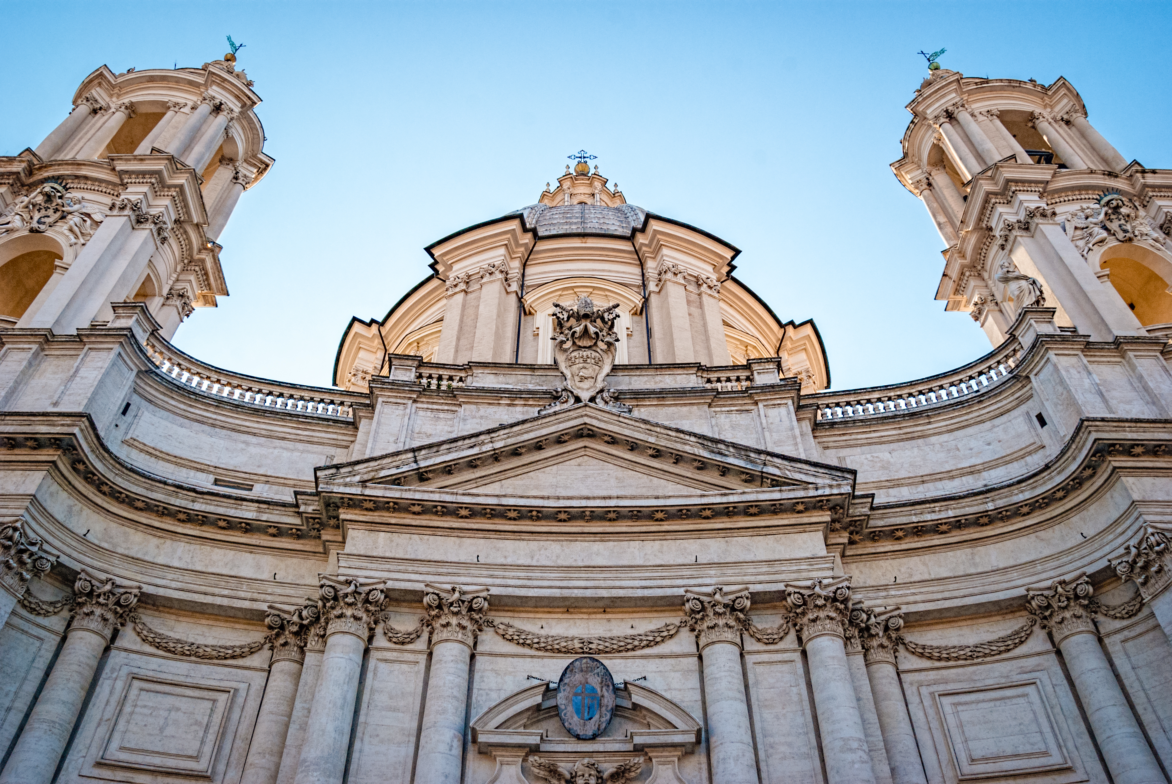 Sant'Agnese in Agone, Rome